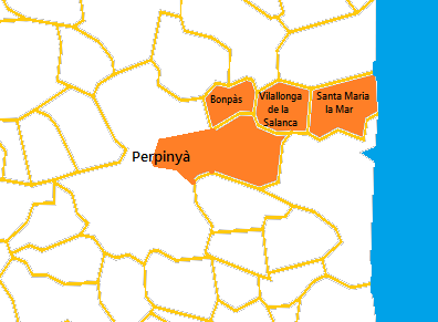 Mapa del Cantó 2 de Perpinyà elaborat a partir d'un mapa de lliure disposició